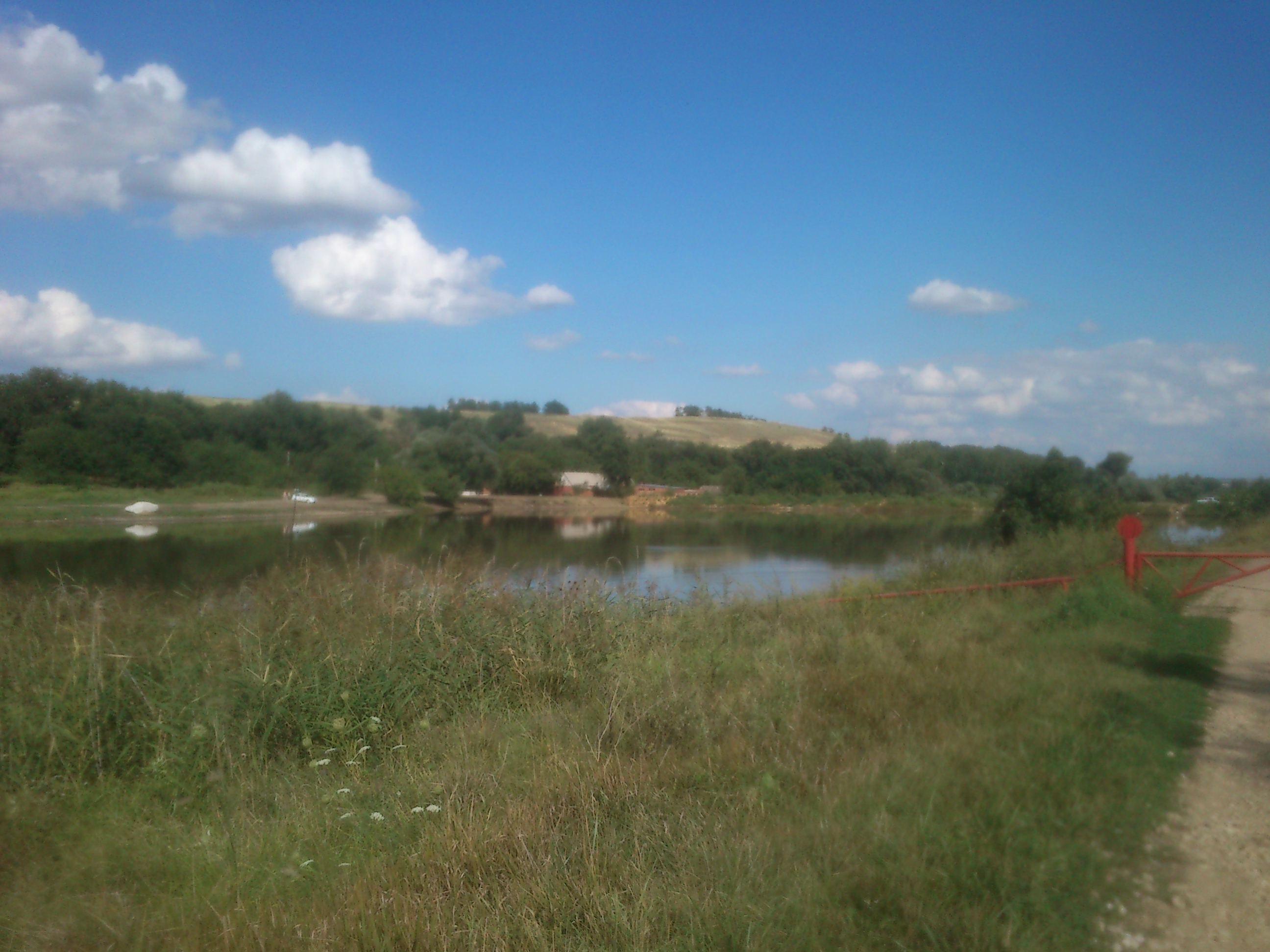 Пруд Черкесский на реке Буйвола, в черте села Гофицкое